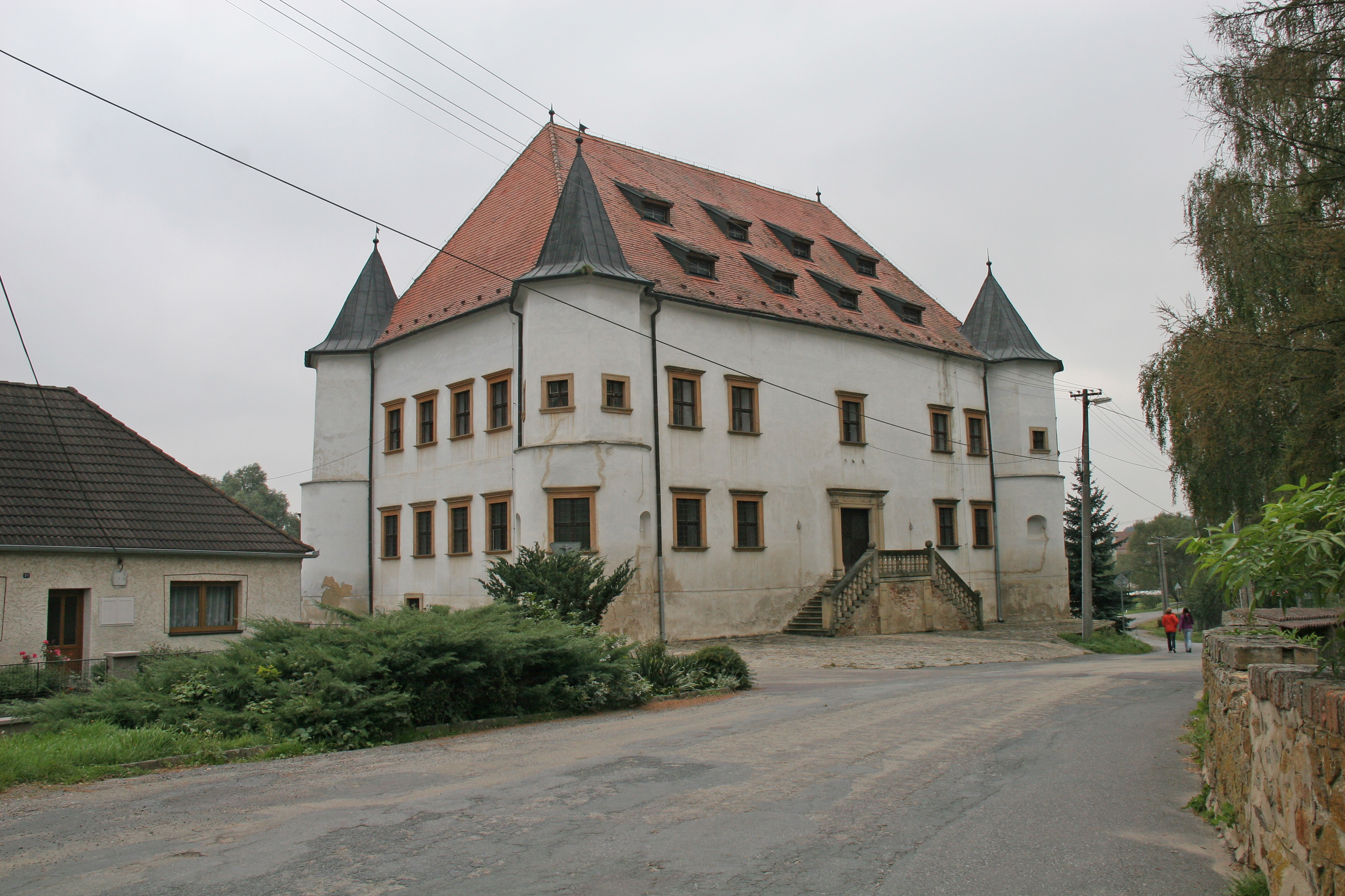 Tvrz, Boskovštejn 32, náves, Boskovštejn.